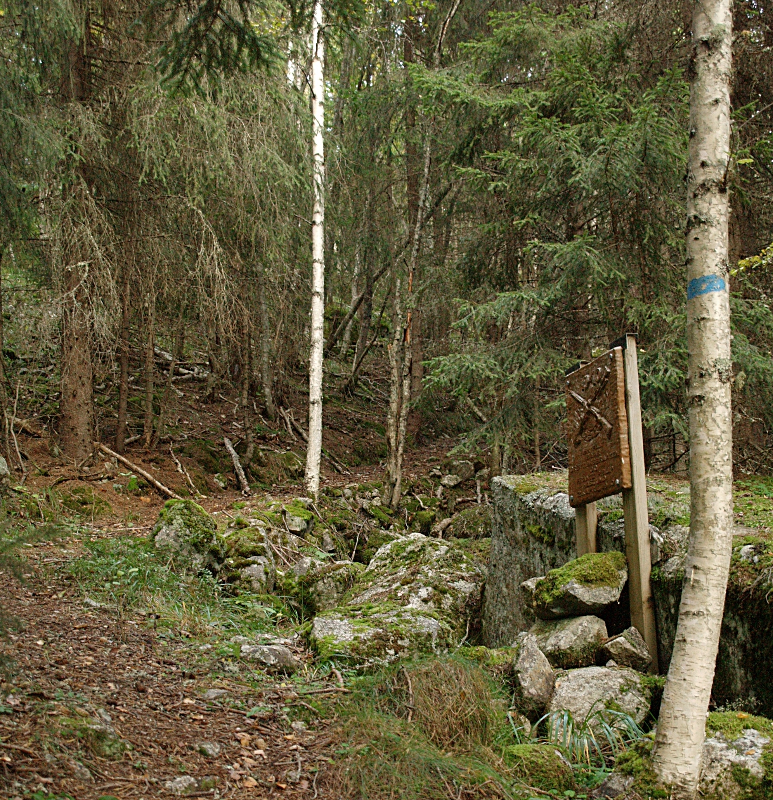 Bjørneskardet farm in Sør-Aurdal, see also Skiløperpatruljen i Mørkedalen